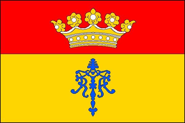 Vlajka obce Vranov v okrese Brno-venkov